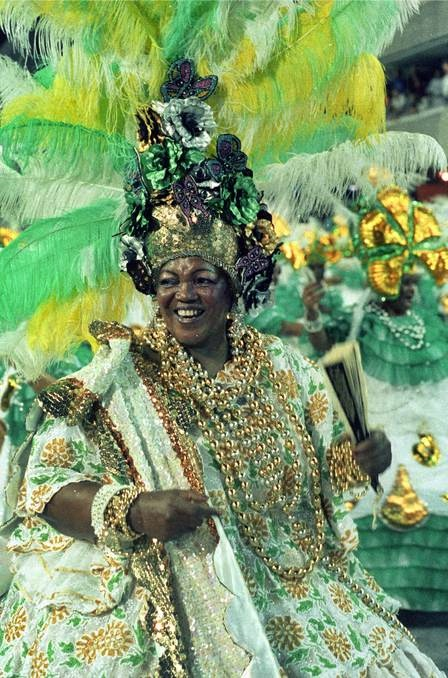 Desfile de Carnaval Império Serrano 1990 no Sambodromo (Otávio Magalhães)